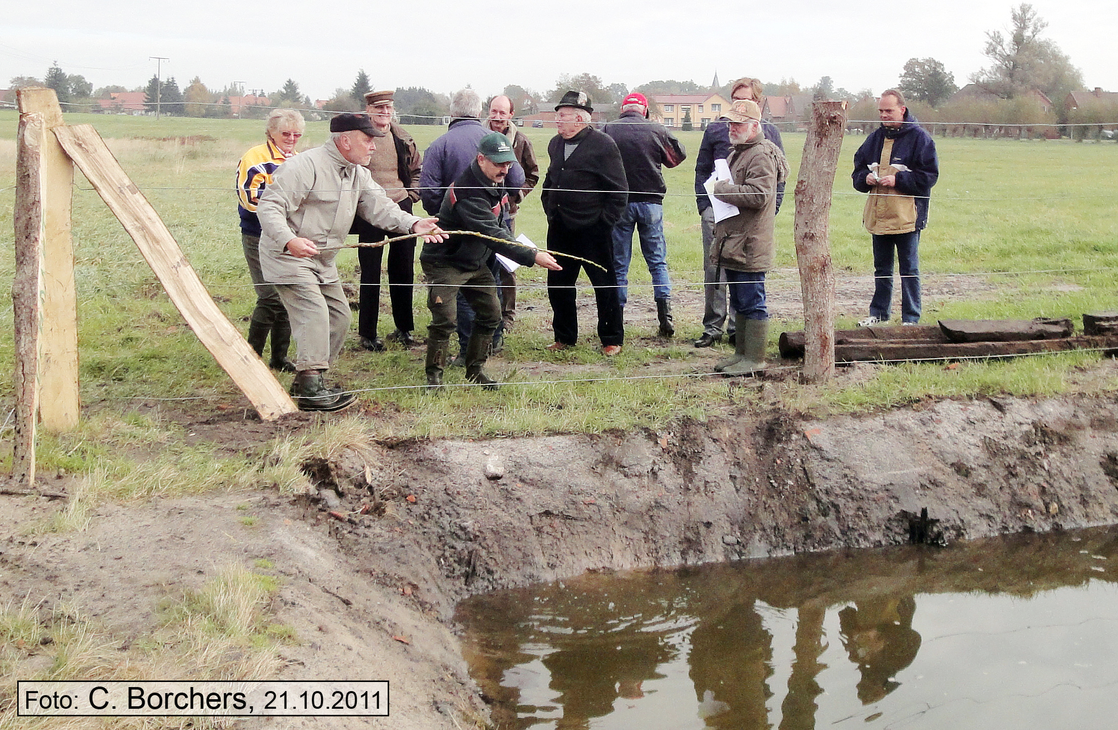 Am 21. Oktober 2011 erfolgte die Einweihung des freigelegten Solebrunnens als geologisches Naturdenkmal. Das Foto zeigt Herrn Dr. Pinzke (1. Reihe links) und Herrn Forstamtsleiter Rink (1. Reihe Mitte) beim Probieren der Salzhaltigkeit der Sole. Herr Wegener (1. Reihe rechts, mit Unterlagen in der Hand) von der Unteren Naturschutzbehörde und Initiator der Wiederaufrichtung dieses Naturdenkmals, schaut prüfend zu.